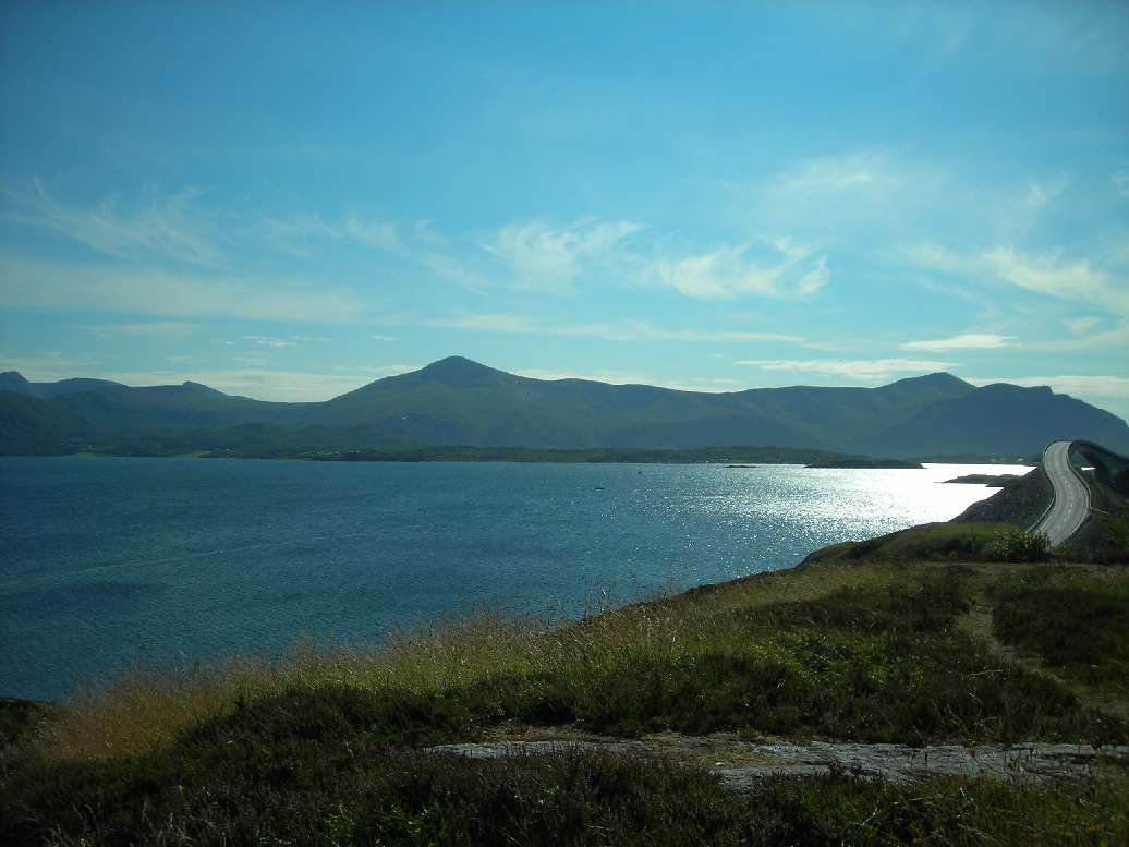 Road 64, Atlanterhavsveien, Storseisundet bridge, Lauvøyfjorden in Norway